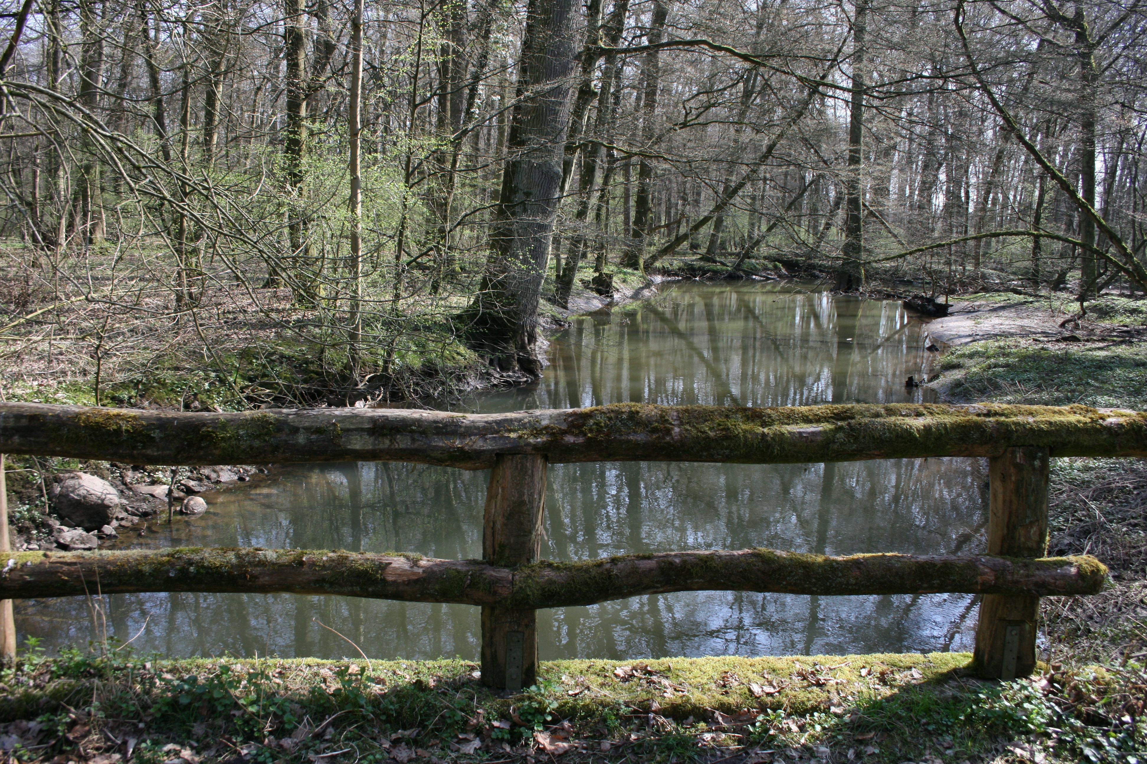 Die Lache (auch Rodenbach in den oberen Abschnitten), Nebenfluss der Kinzig in Hessen. Typischer Flussverlauf im Naturschutzgebiet „Erlensee bei Erlensee“ in der Bulau zwischen Hanau und Erlensee.